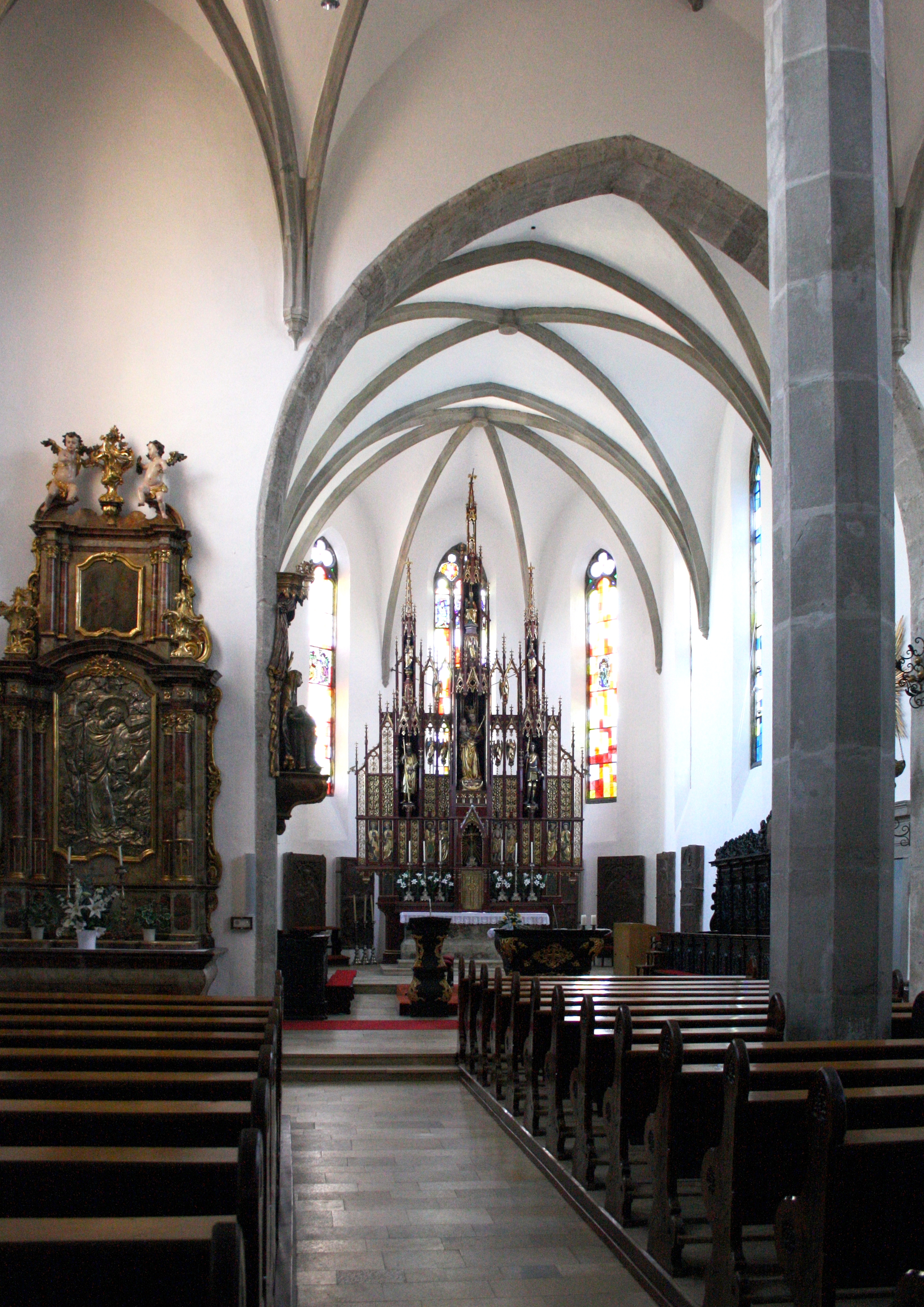 Innenansicht der oberösterreichischen Wallfahrtskirche Maria Schöndorf Richtung Hochaltar.